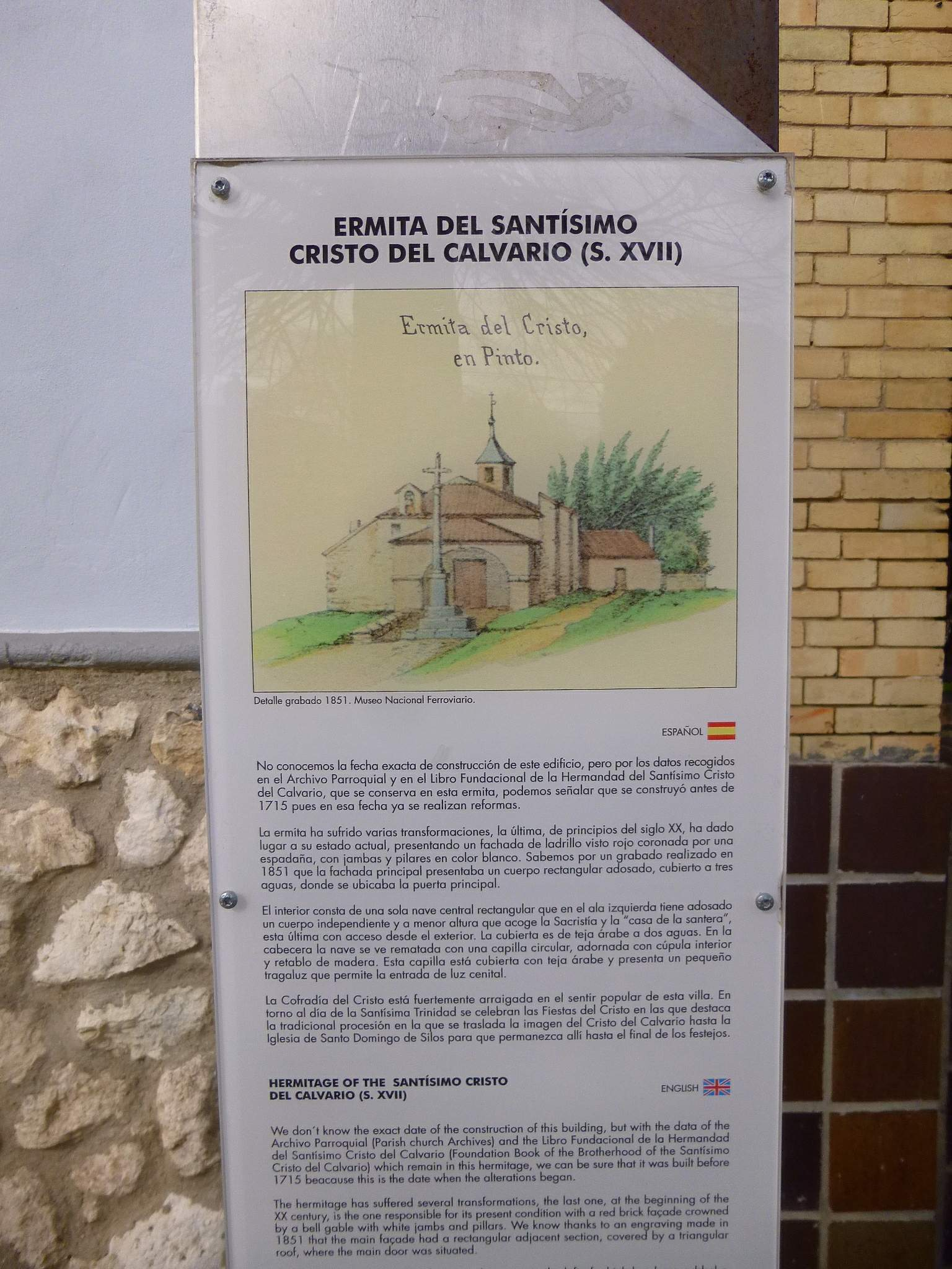 Ermita del Santisimo Cristo del Calvario (Pinto)